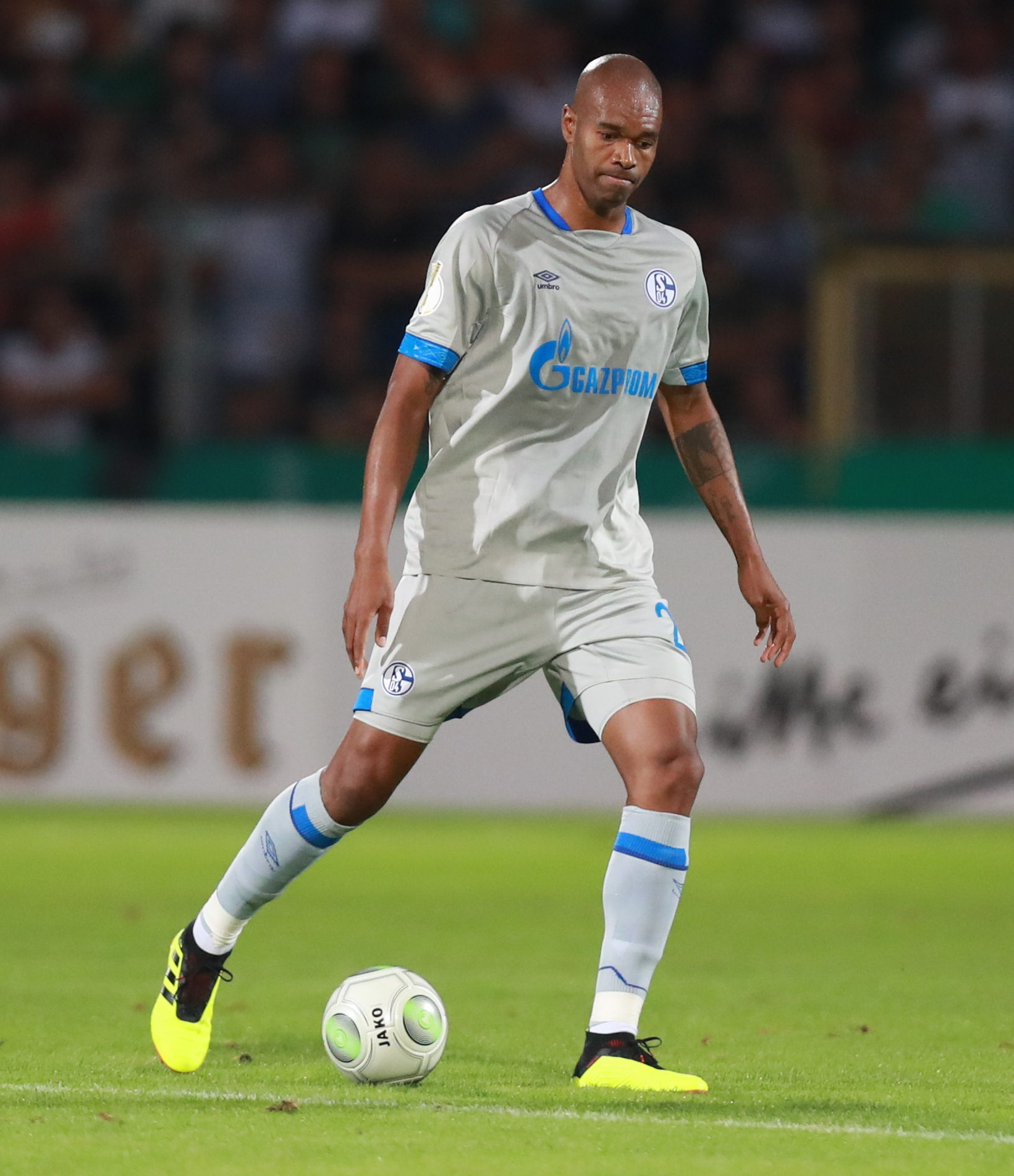 DFB-Pokal 2018/19, 1. Hauptrunde: 1. FC Schweinfurt 05 gegen FC Schalke 04 0:2 (0:1)